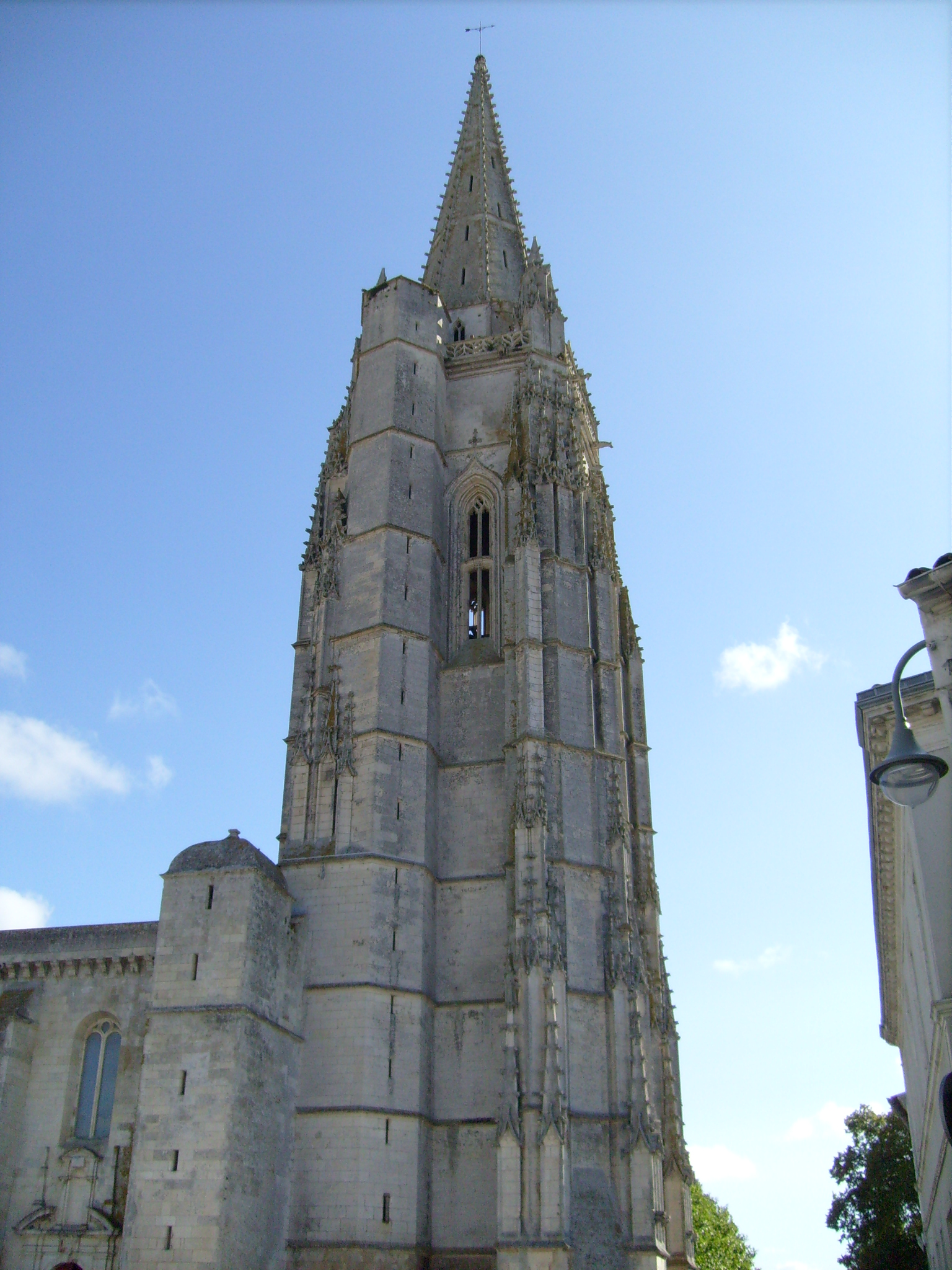 Eglise de Marennes